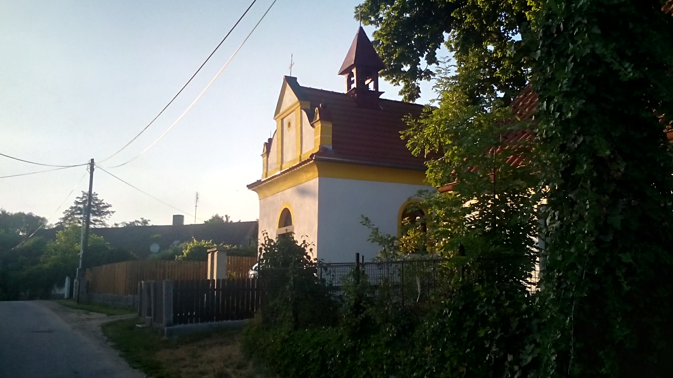 Řečice- kaple ve středu osady